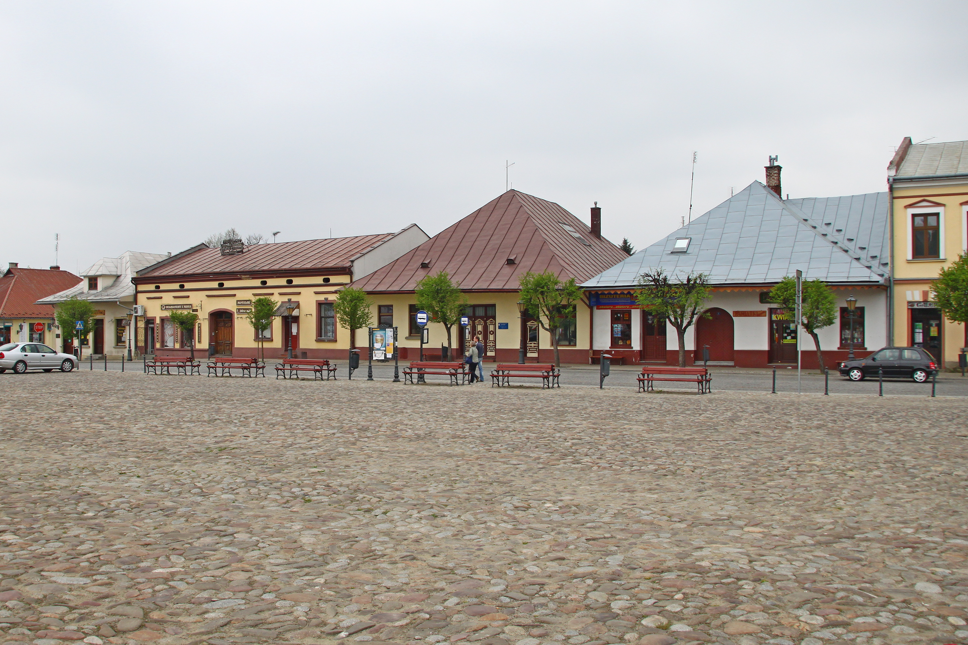 Stary Sącz, dom, 1795, XIX